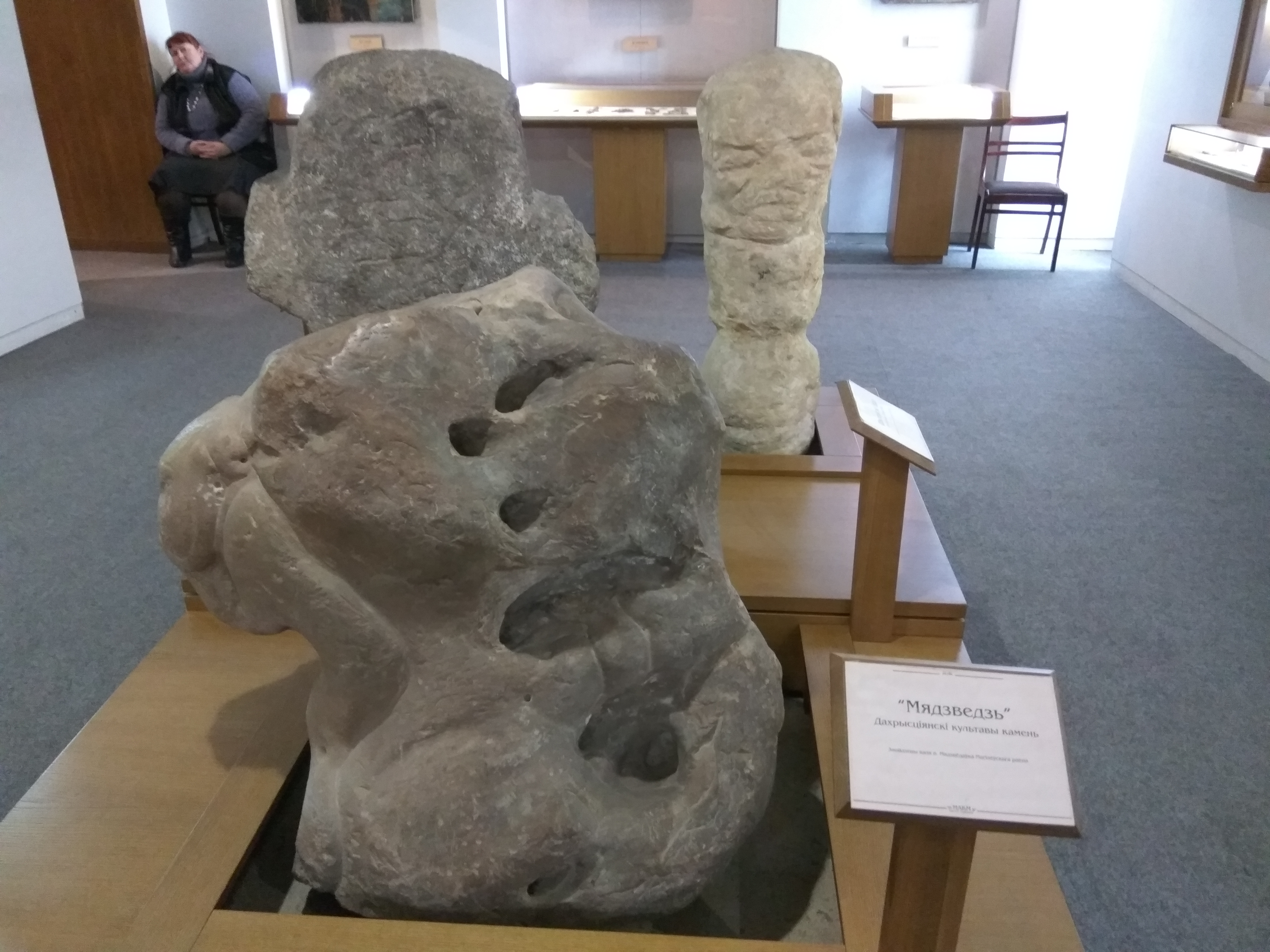 Магілёўскі абласны краязнаўчы музей. Гісторыя краю з IX ст. да 1917 г. Дахрысціянскі культавы камень Мядзведзь. Знойдзены каля вёскі Мядзвёдаўка Магілёўскага раёна